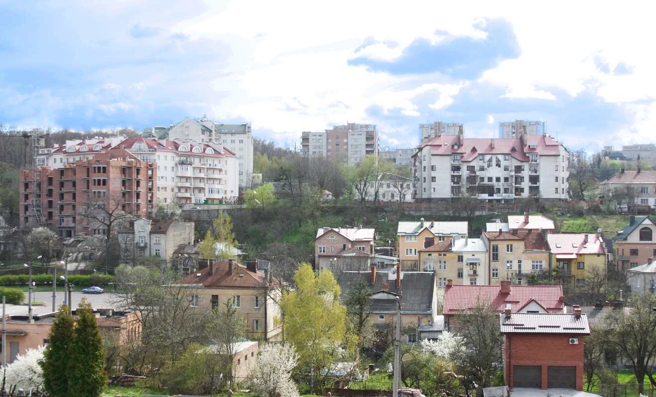 Вид на район Погулянка во Львове